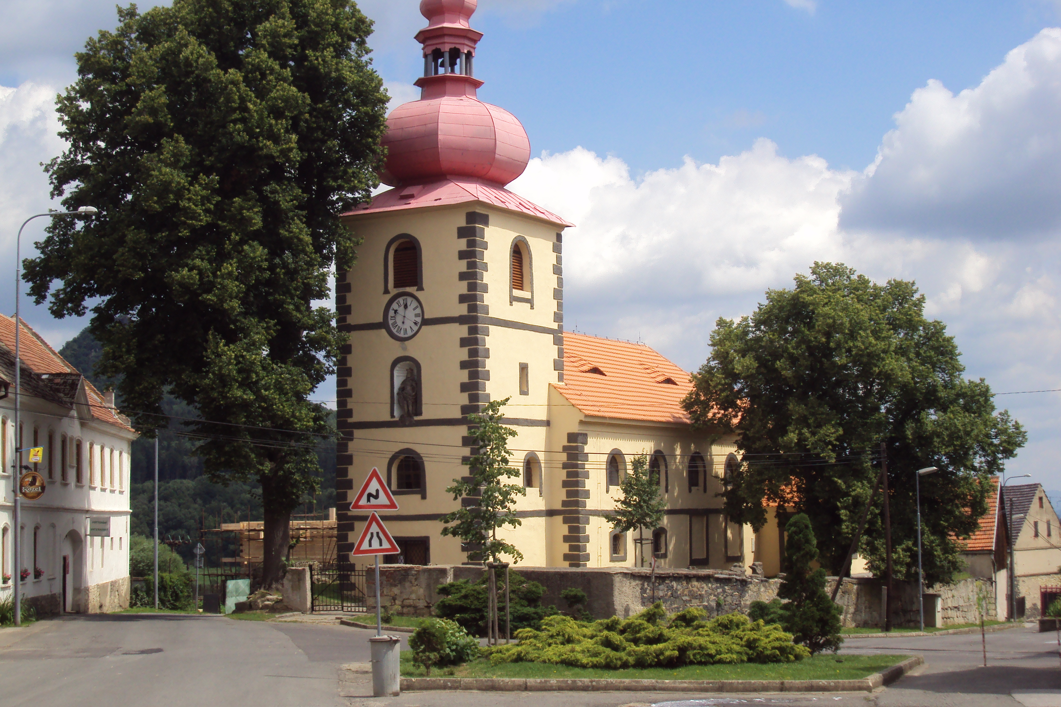 Kostel sv.Václava v Blíževedlech